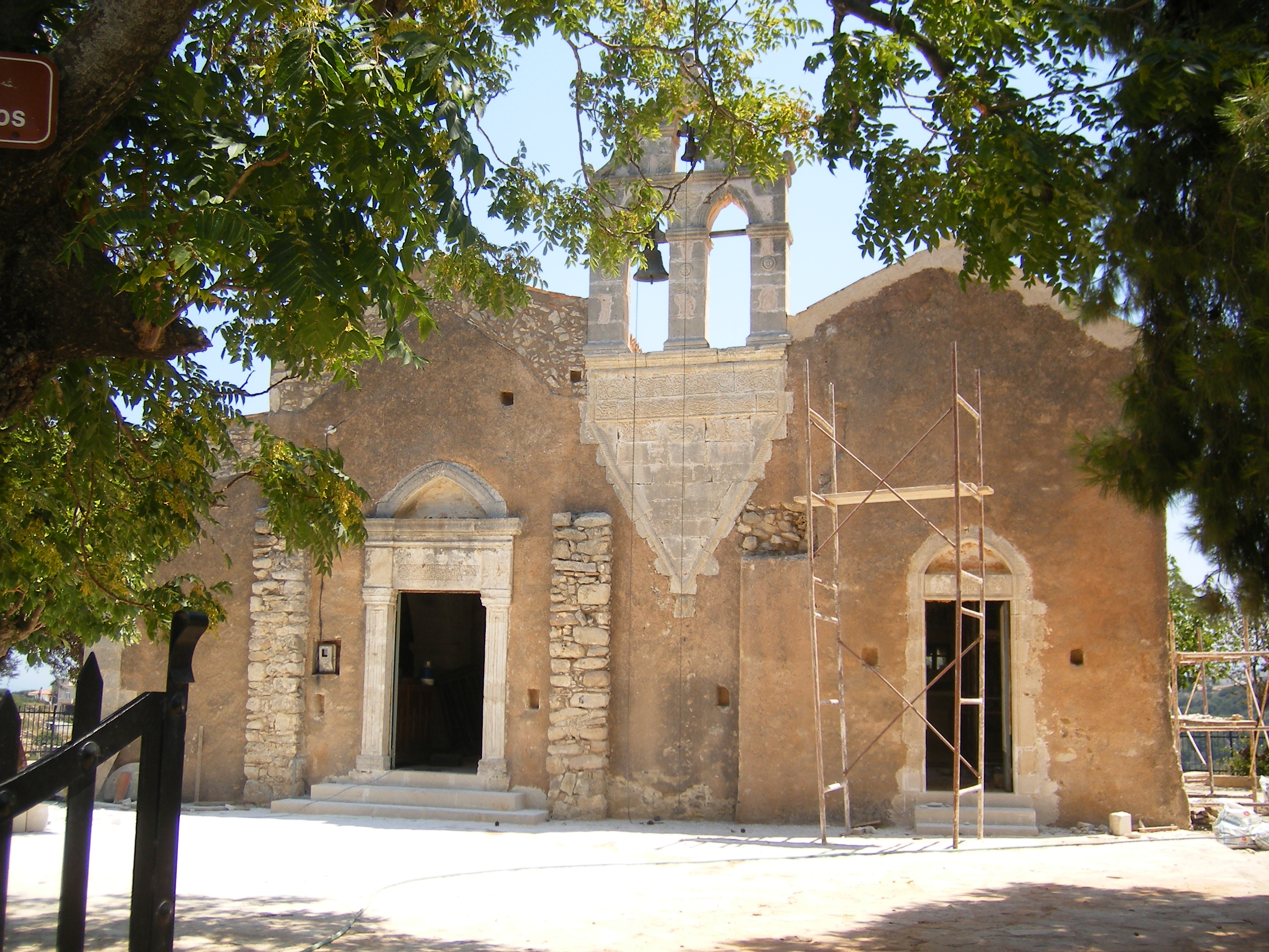 Eglise Aghios Georgios, Kournas, Crète